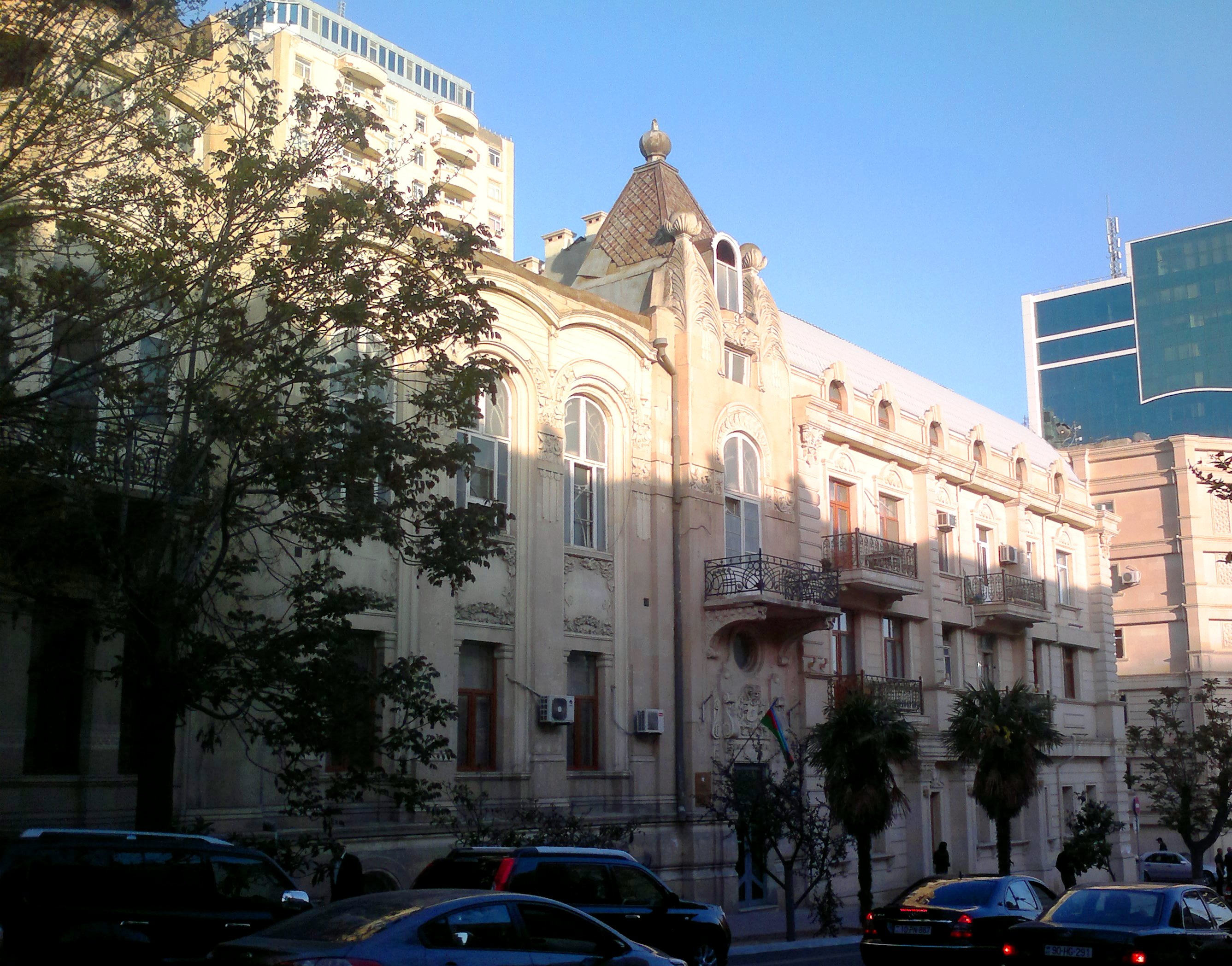 Building of Yasamal Rayon Municipality on 12 Jafar Jabbarly Street. Built in 1915.